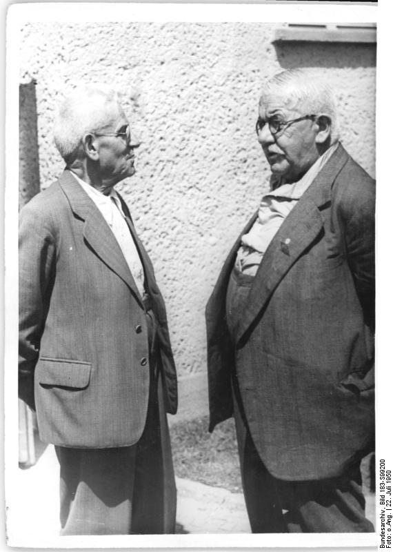 Zentralbild Ben-Rich III. Parteitag der Sozialistischen Einheitspartei Deutschlands vom 20. bis 24. Juli 1950 in der Werner-Seelenbinderhalle in Berlin UB.z.: Die beiden Partei-Veteranen Adolf Ruprecht, 76 Jahre alt, der heute noch eine leitende Stellung im Wirtschaftsleben ausübt, und Georg Schöpflin, 82 Jahre alt, nehmen ebenfalls als Delegierte am Parteitag teil. 7294-50 87) Mlk 22.7.50